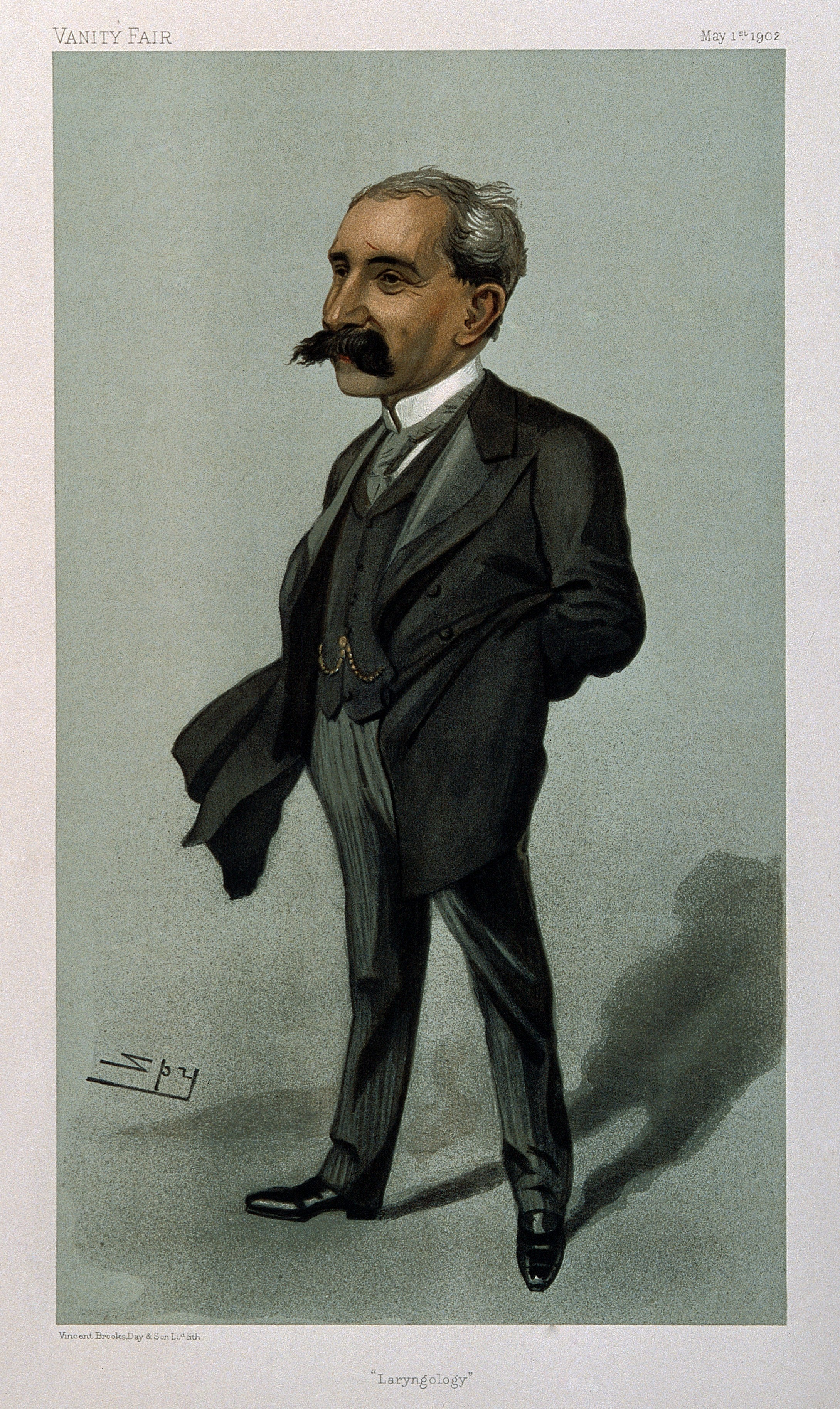 Genre/Technique: Portrait prints. Lithographs. Subject name: Semon, Felix, 1849-1921.